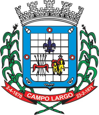 Bandeira de Campo Largo